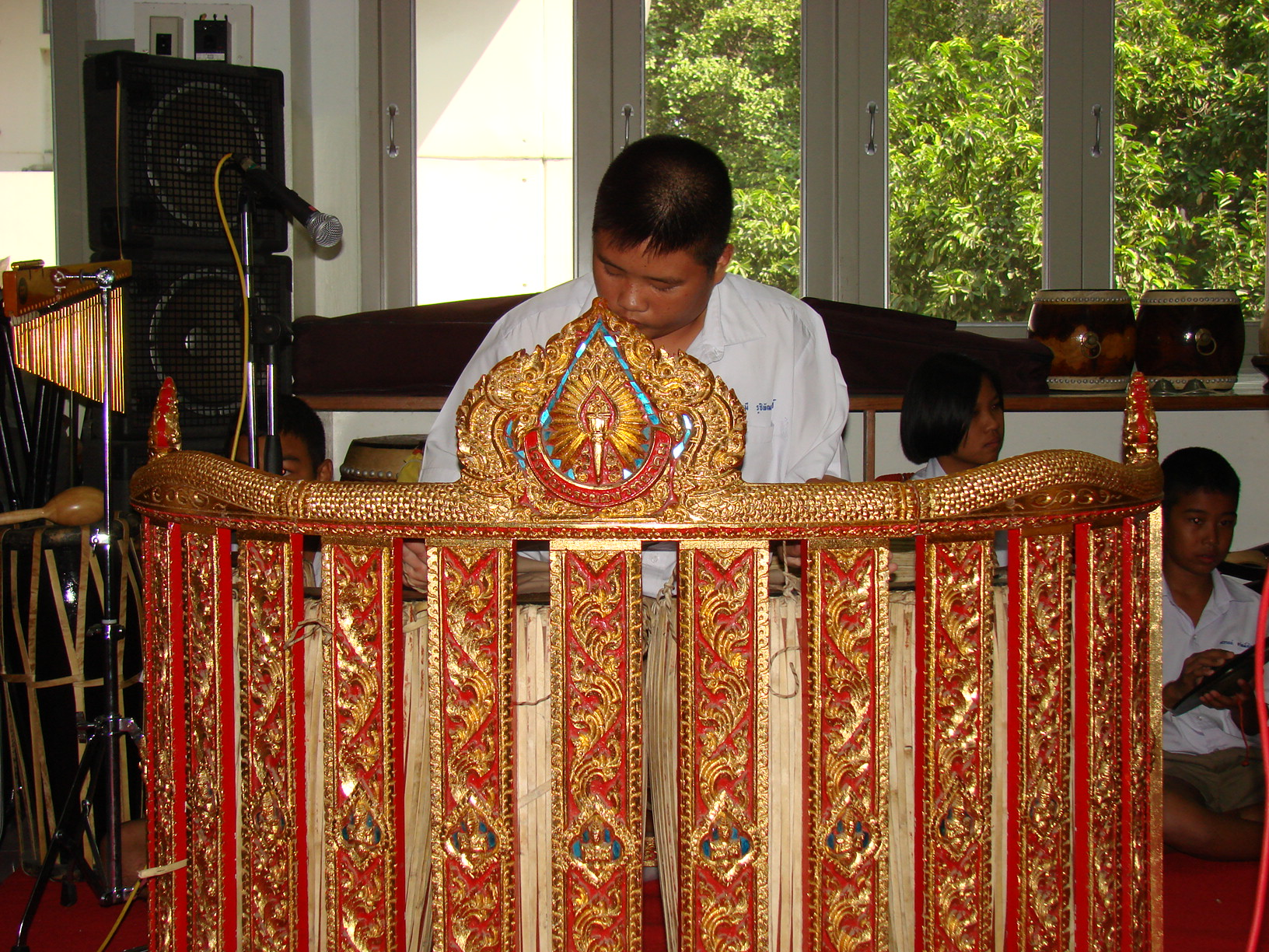 เปิงมางคอก